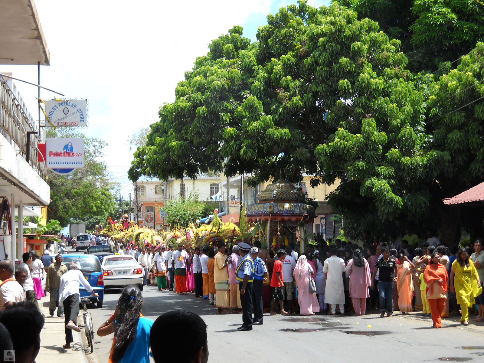 Thaipoosam Cavadee Festival in Mauritius